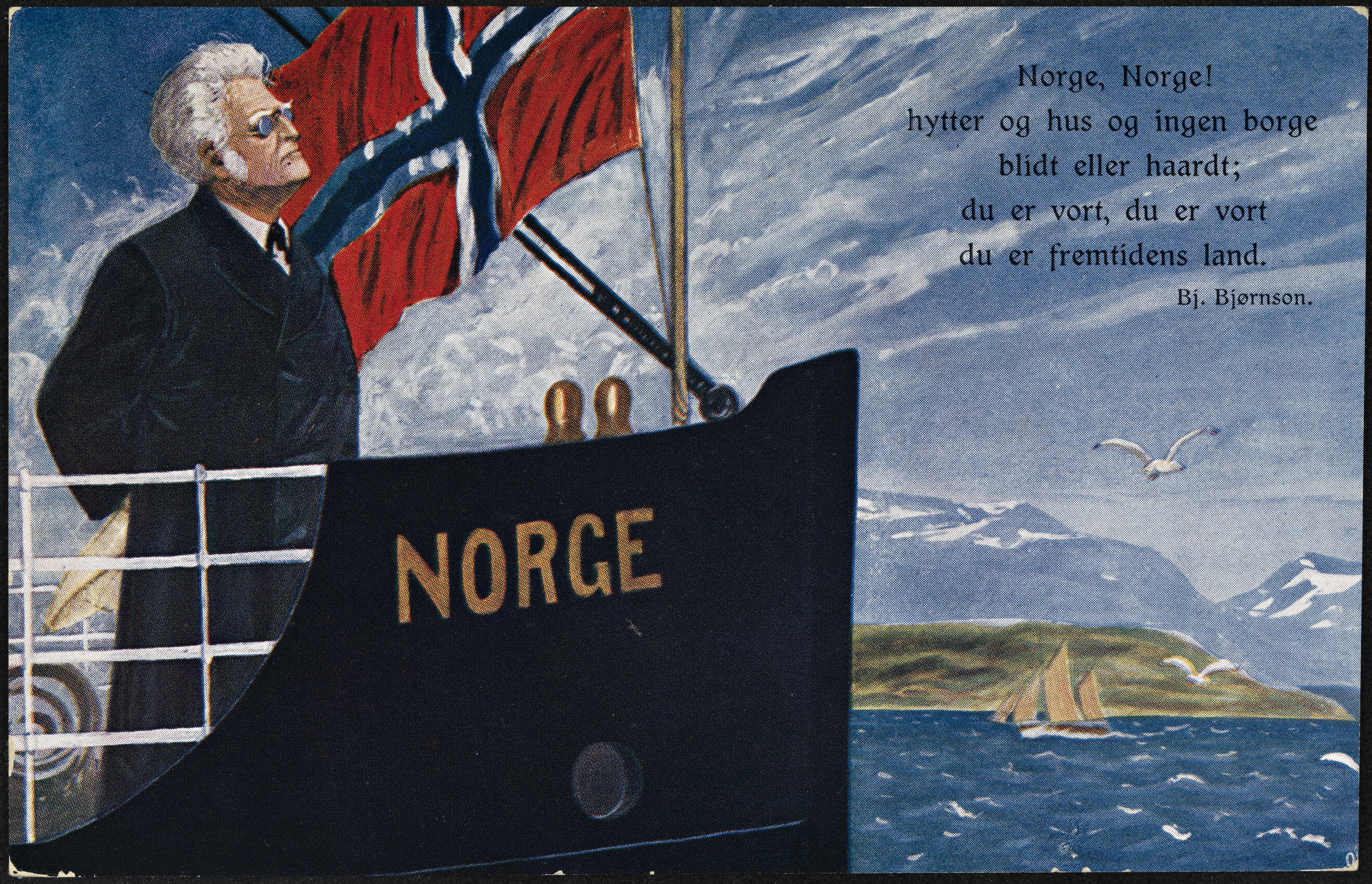 Tittel / Title: Norge, Norge! Beskrivelse / Description: Postkort / Postcard. Diktet "Norge, Norge!" av Bjørnstjerne Bjørnson (1832-1910). Dato / Date: ca 1914 Kunstner / Artist: ukjent / unknown Utgiver / Publisher: M & Co. Eier / Owner Institution: Nasjonalbiblioteket / National Library of Norway Lenke / Link: Bildesignatur / Image Number: bldsa_BB1275